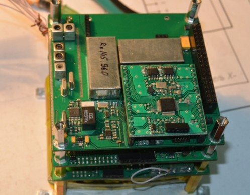 Радіоканал cупутника КПІ PolyITAN-2